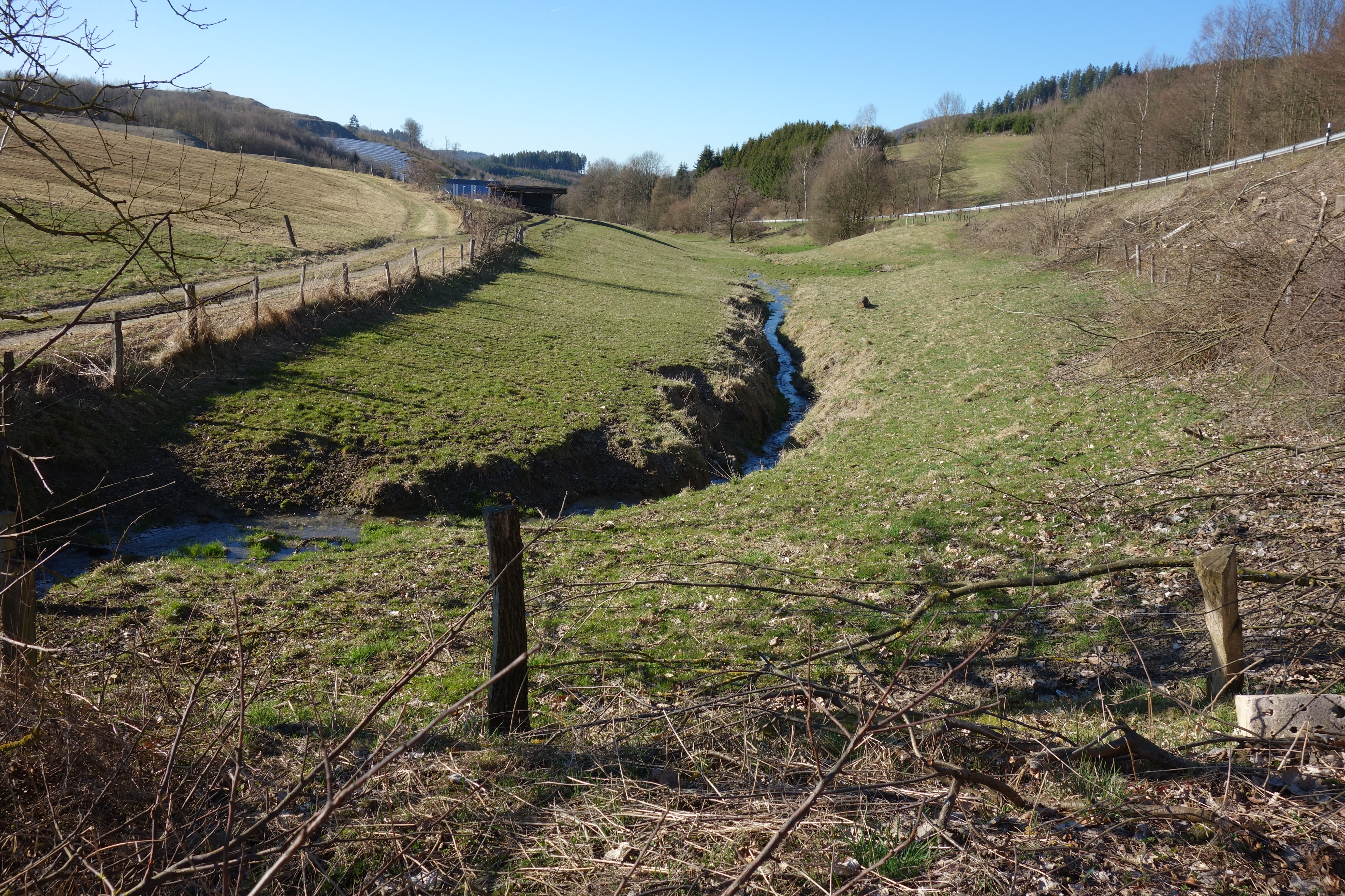 Nördliche Bereich vom "Landschaftsschutzgebiet Oberlauf der Kleinen Henne nordwestlich Westernbödefeld" rechts und links vom Bach und im Hintergrund das Landschaftsschutzgebiet Schmallenberg.